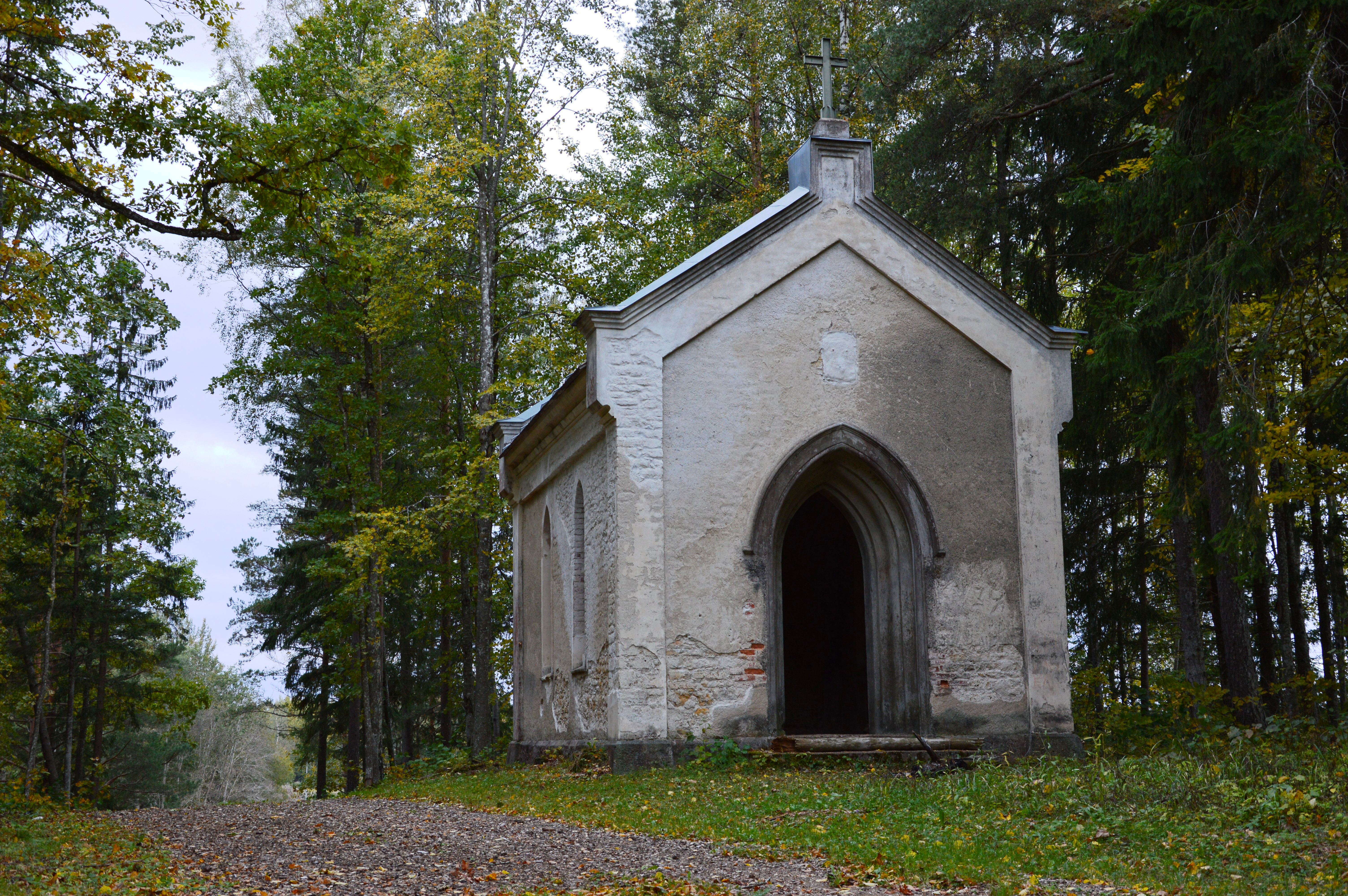 Mäetaguse kabel